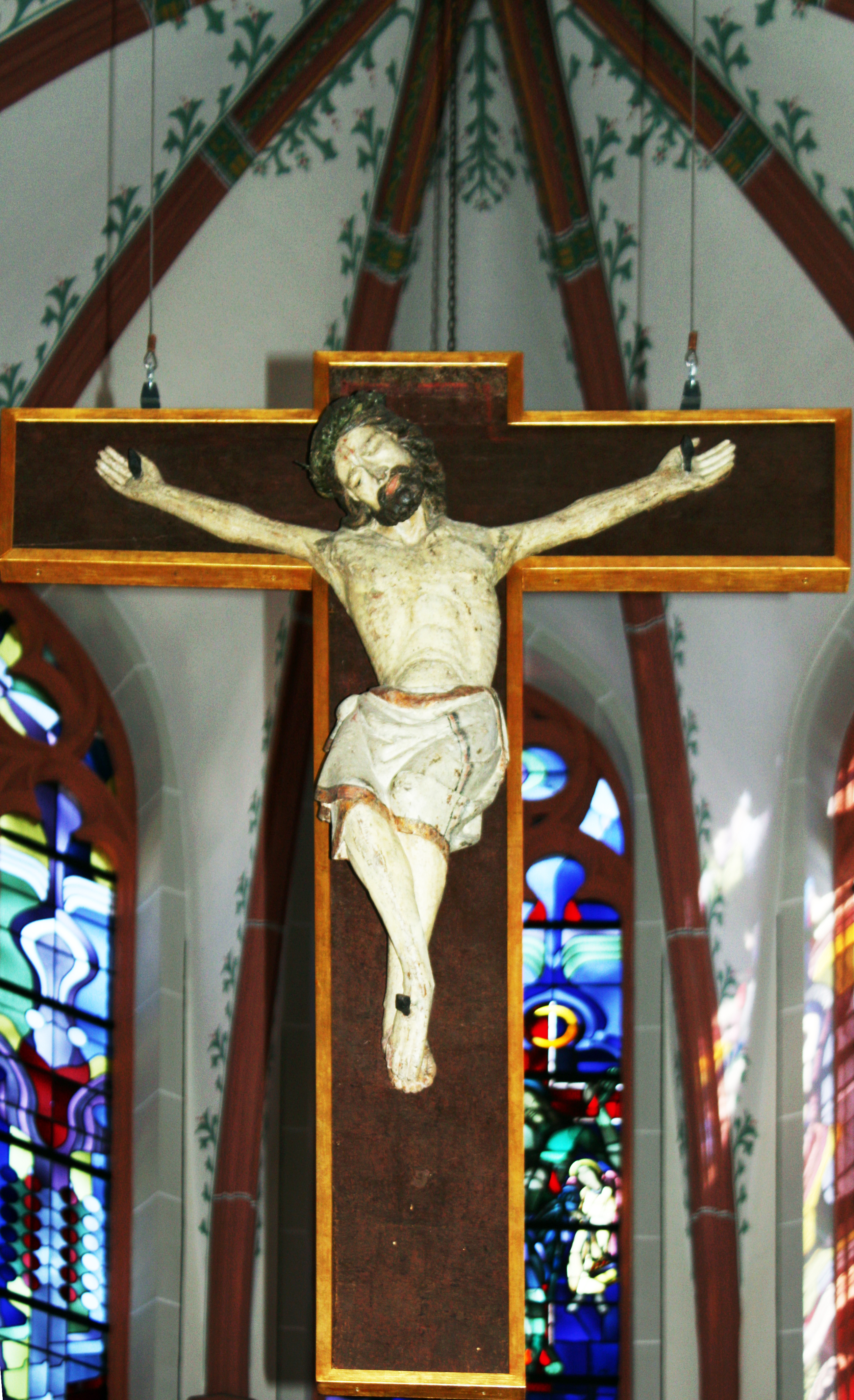 Chorkreuz der Pfarrkirche St. Martin in Friesheim (Erftstadt)